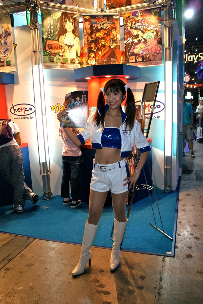 2009東京電玩展，Kemco攤位的宣傳模特兒。